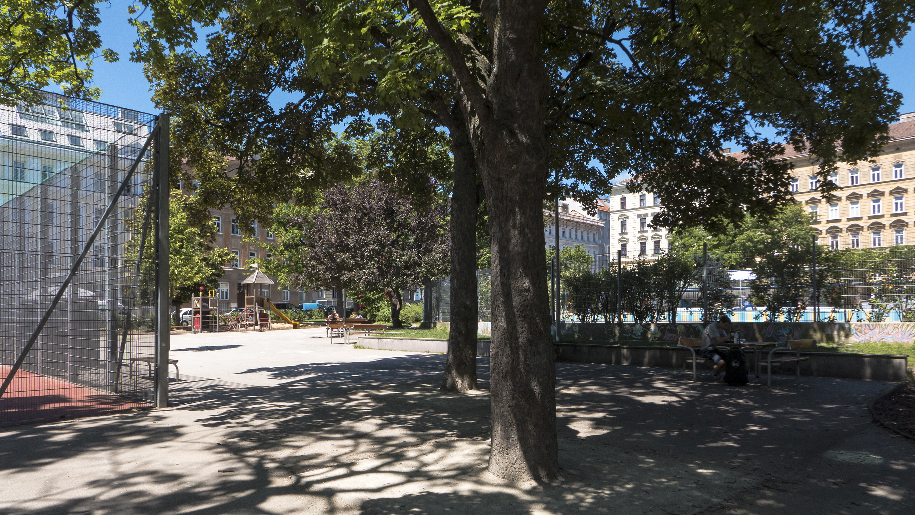 Reinlpark in Wien 14